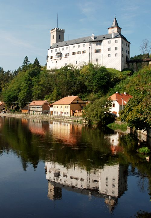 Hrad Rožmberk